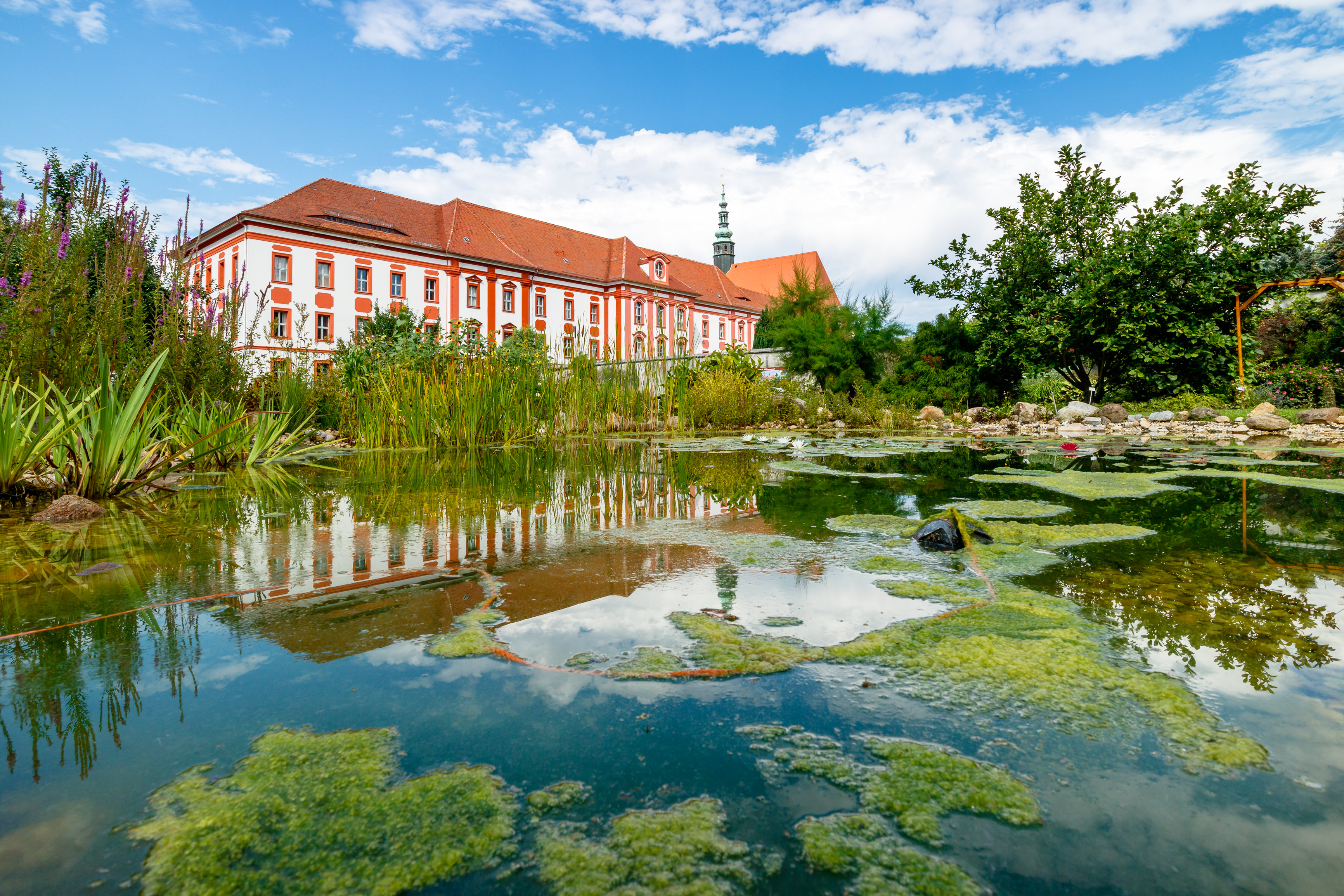 Das Kloster Sankt Marienstern (obersorbisch Klóšter Marijina Hwězda) ist eine Zisterzienserinnen-Abtei und liegt am Klosterwasser in Panschwitz-Kuckau in der sächsischen Oberlausitz. Hornjoserbsce: Klóšter Marijina hwězda w Pančicach-Kukowje.